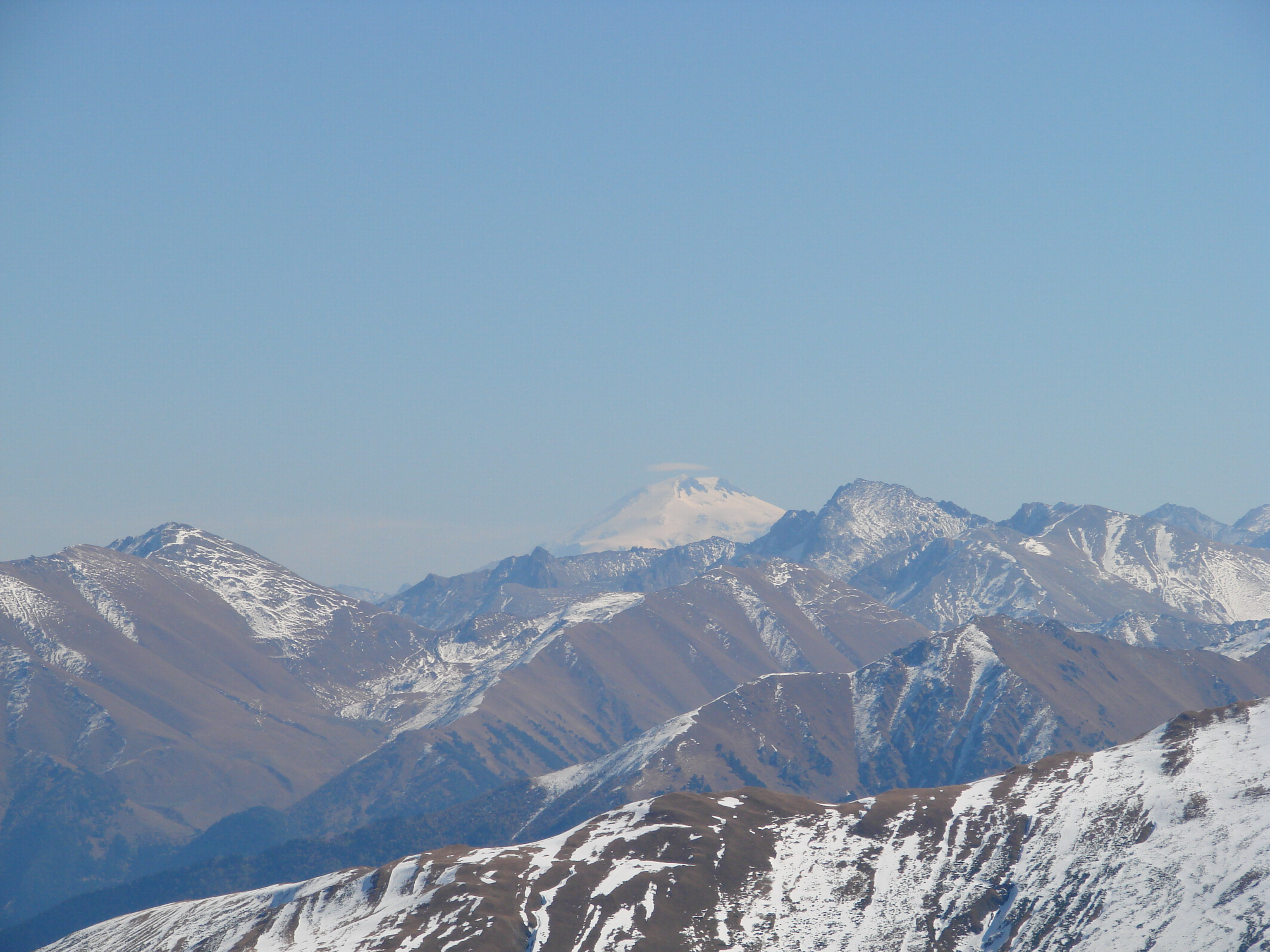 эльбрус